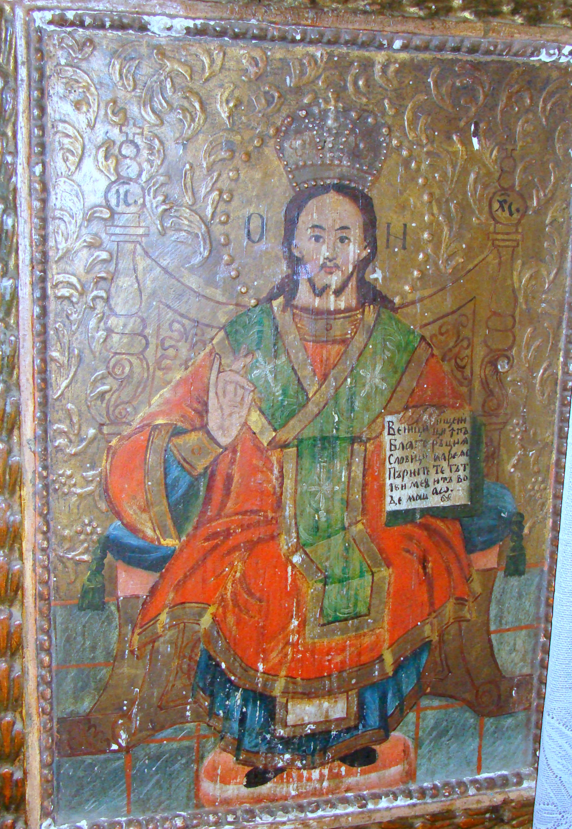 Biserica de lemn din Căzănești-Hunedoara